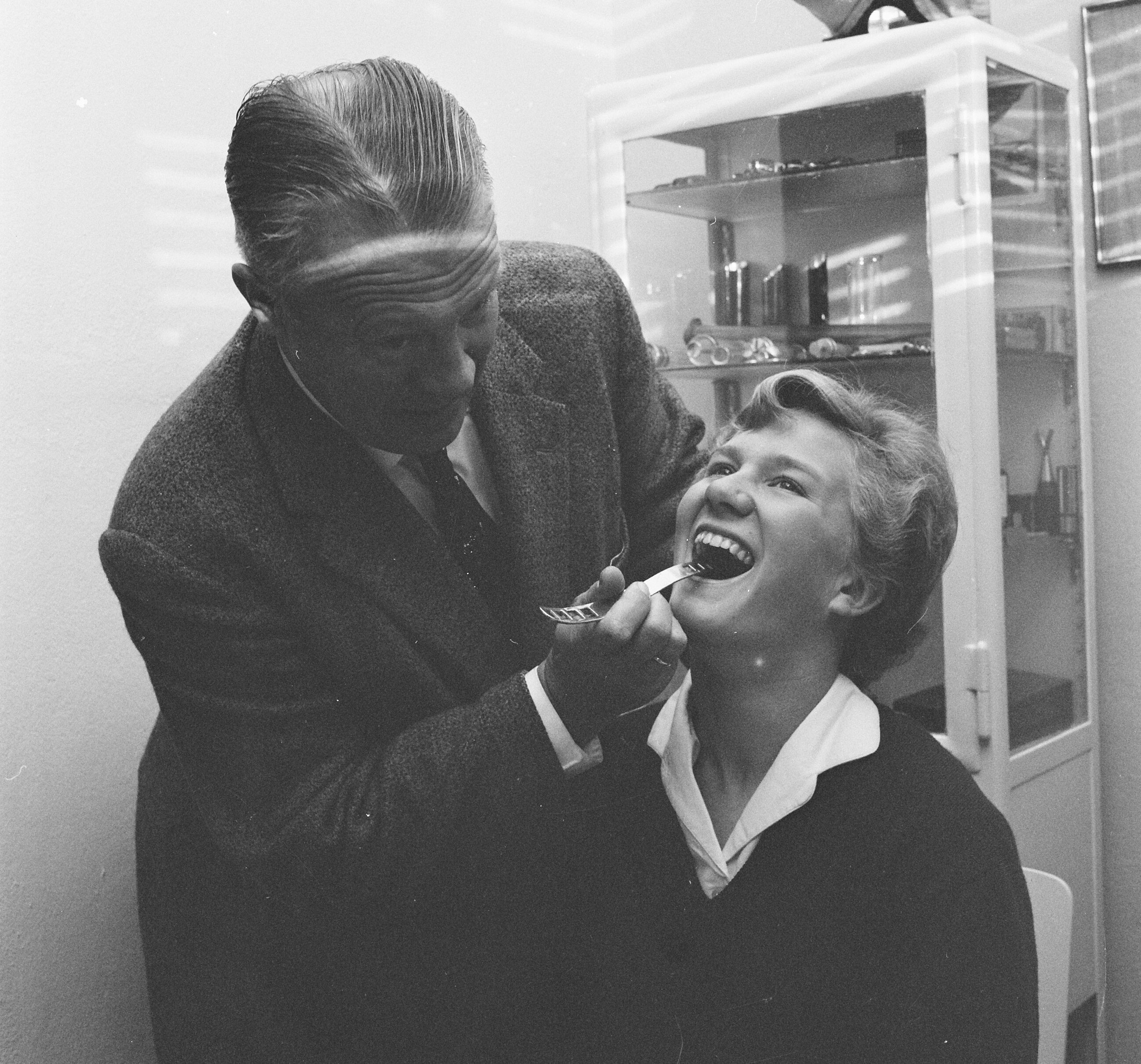 Collectie / Archief : Fotocollectie Anefo Reportage / Serie : [ onbekend ] Beschrijving : Sjoukje Dijkstra een dag thuis na de Europese Kampioenschappen in Garmisch, Sjoukje Dijkstra wordt do haar vader onderzocht Datum : 9 februari 1960 Locatie : Garmisch Trefwoorden : KAMPIOENSCHAPPEN, VADER Persoonsnaam : Dijkstra, Sjoukje Fotograaf : Behrens, Herbert / Anefo Auteursrechthebbende : Nationaal Archief Materiaalsoort : Negatief (zwart/wit) Nummer archiefinventaris : bekijk toegang 2.24.01.03 Bestanddeelnummer : 911-0150 Reacties Geplaatst door Sportliefhebber op 25 juli 2017 - 19:35. vader en huisarts Lou Dijkstra Persoonsnaam: Dijkstra, Lou